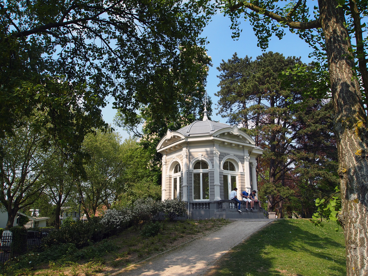 Theekoepel, ook wel Gloriette geheten, in het Proosdijpark te Meerssen